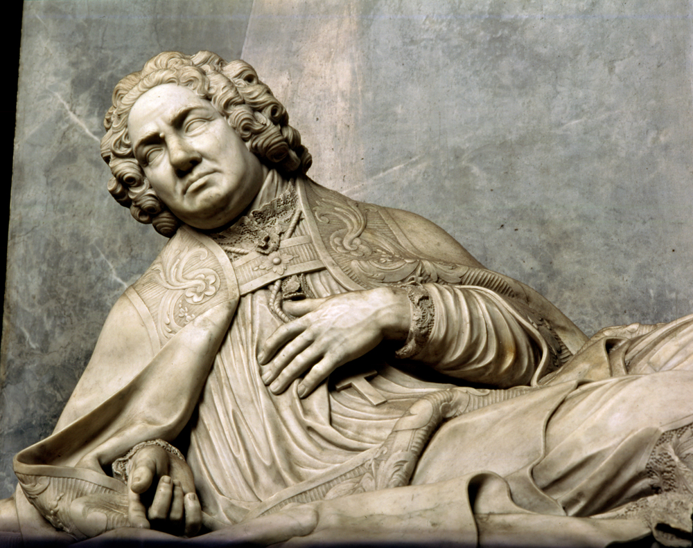 Sint-Baafskathedraal, Gent Jacques Bergé, Praalgraf van Joannes-Baptist De Smet door J. Bergé, 1745; inv: 242